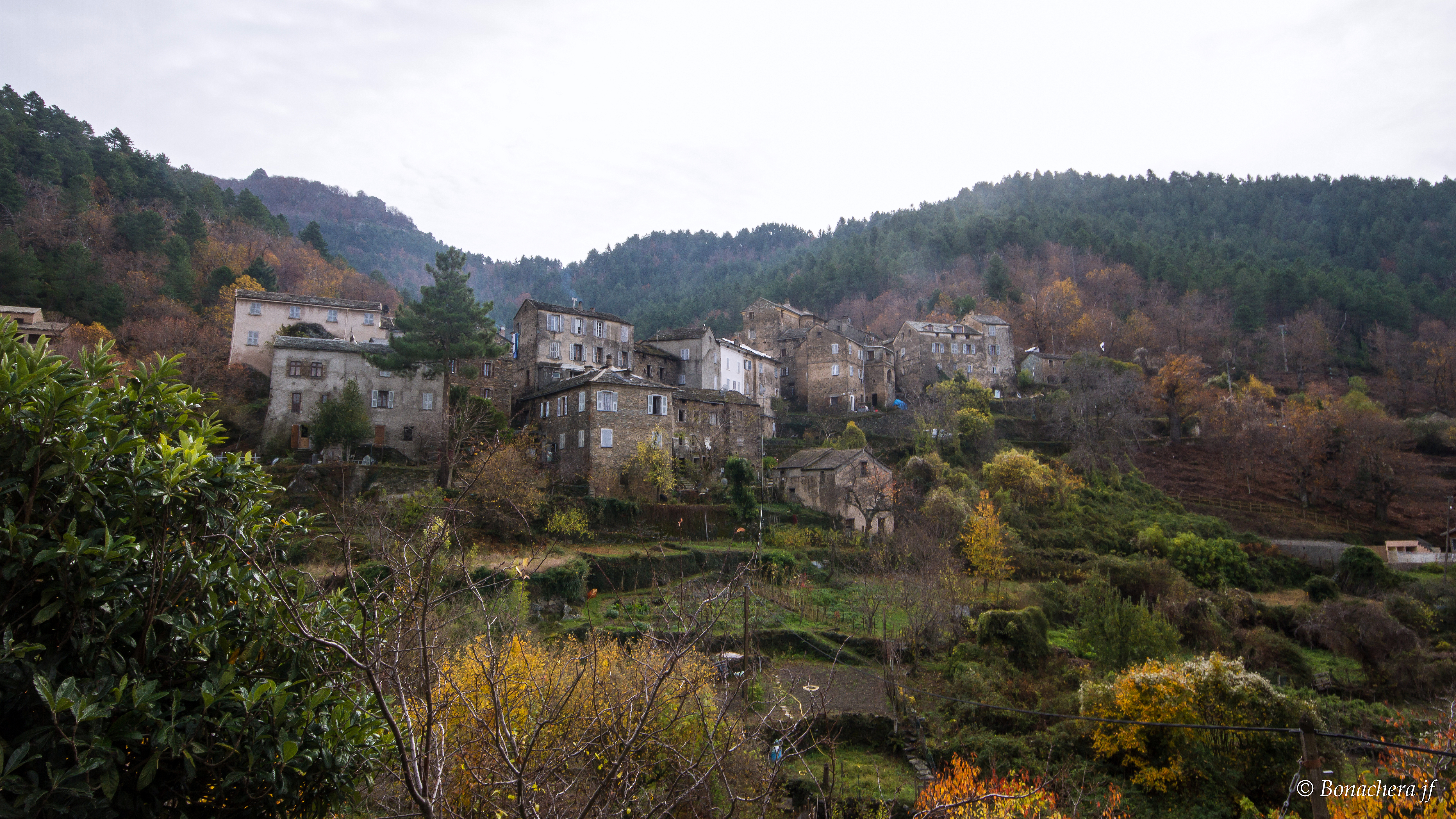 Saliceto, Castagniccia (Corse) - Vue du village depuis la route vers Gavignano (D639)